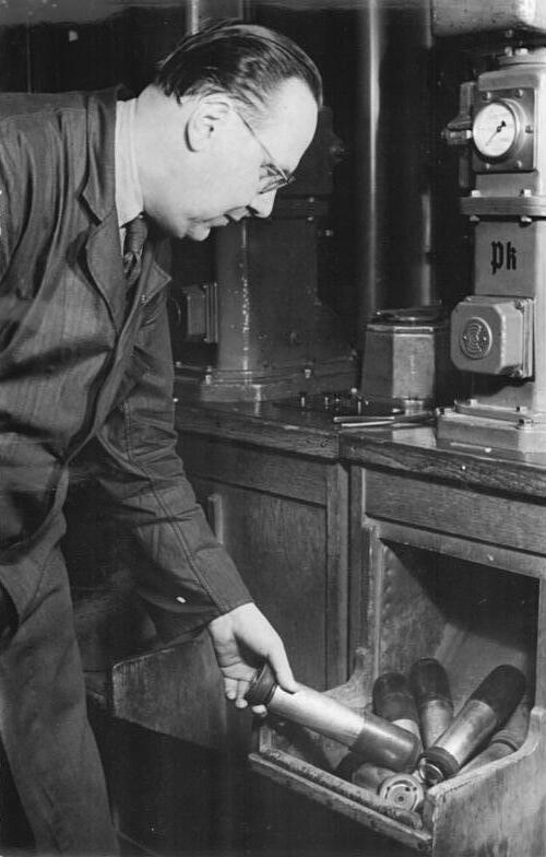 Illus Martin 29.11.51 75 Jahre Rohrpost in Berlin Am 1. Dezember 1951 besteht die Berliner Rohrpost 75 Jahre. Die zentrale der Berliner Rohrpost und zugleich modernste Schnellrohrpostanlage Europas ist das Haupttelegrafenamt in der Oranienburger Strasse. Hier trifft die Post von den jeweiligen Postämtern ein und wird zu den jeweiligen Bestimmungsämtern weiterbefördert. UBz: Von allen Postämtern treffen ständig Rohrpostsendungen ein.